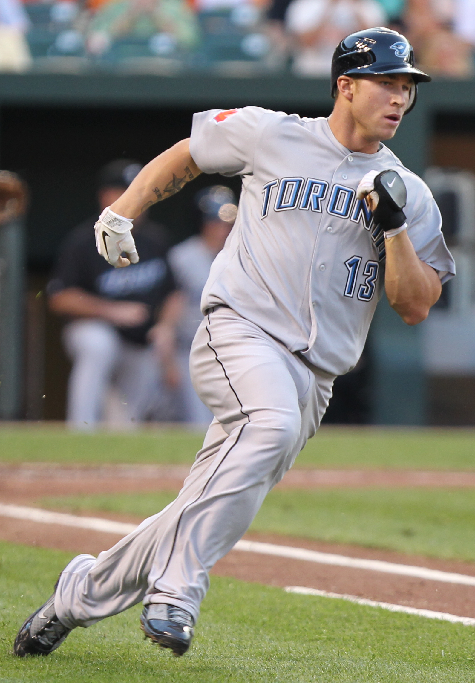 Brett Lawrie